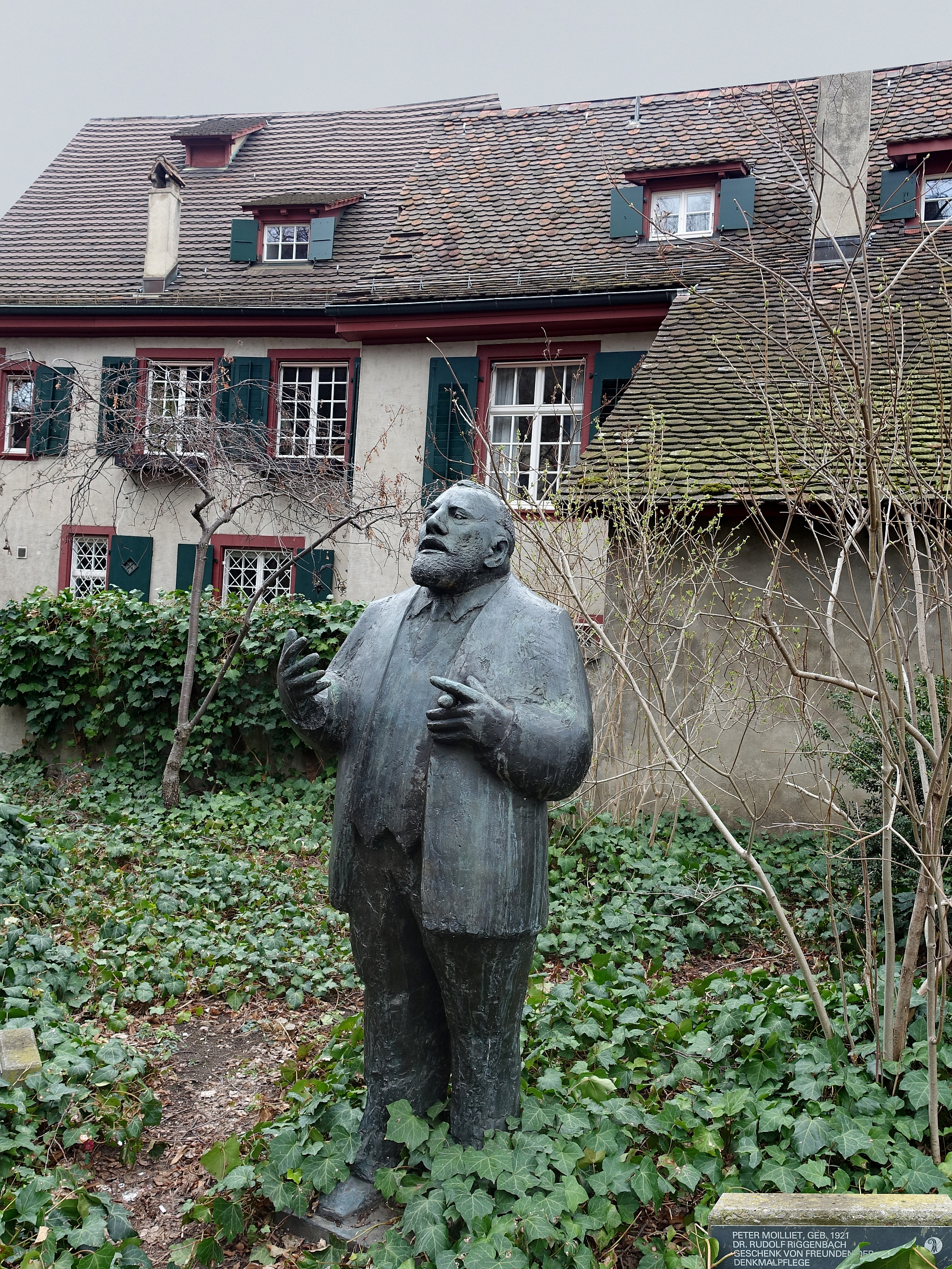 Rudolf Riggenbach (1810–1863) Denkmalpfleger, Skulptur Titel: Dinge Dinge, von Peter Moilliet (1921–2016) Bildhauer, auf dem Leonhardskirchplatz, Standort: 47° 33′ 19,84″ N, 7° 35′ 16,67″ E